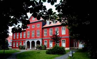 privates Digitalfoto: Juergen Bode 2002 Zum Artikel selbst angefertigt Juergen Bode 15:09, 14. Jul 2004 (CEST)